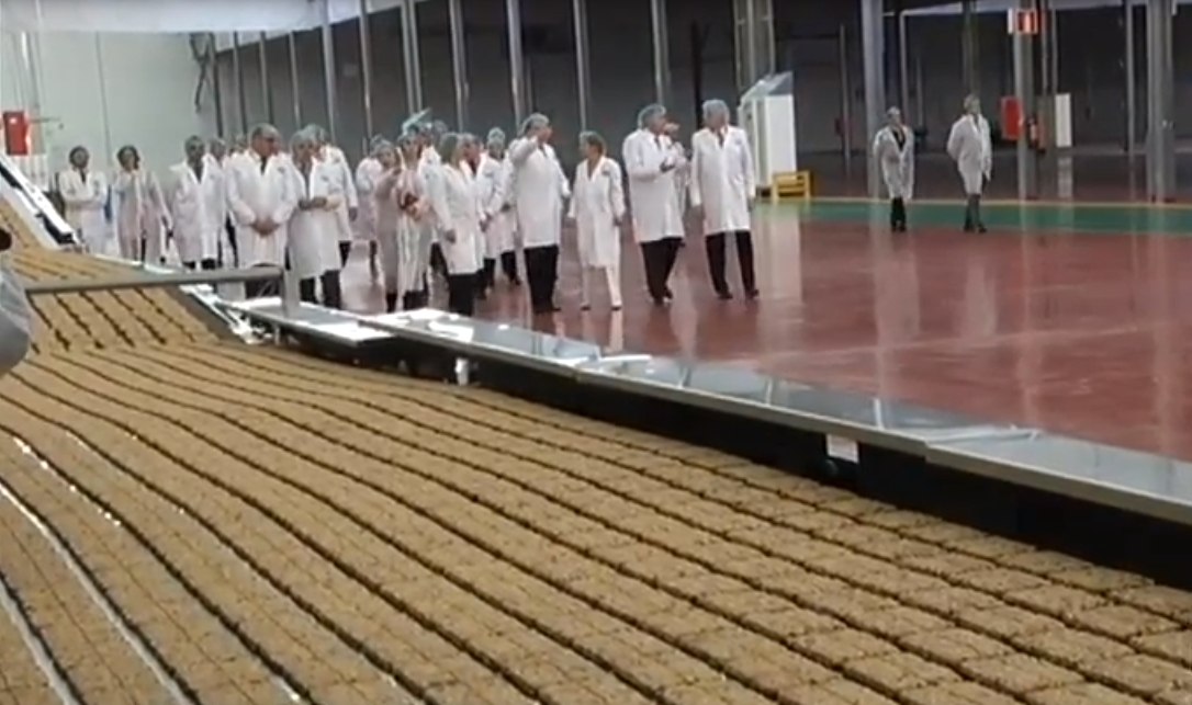 Visita a la fábrica de galletas de Gullón en Aguilar de Campoo (provincia de Palencia).